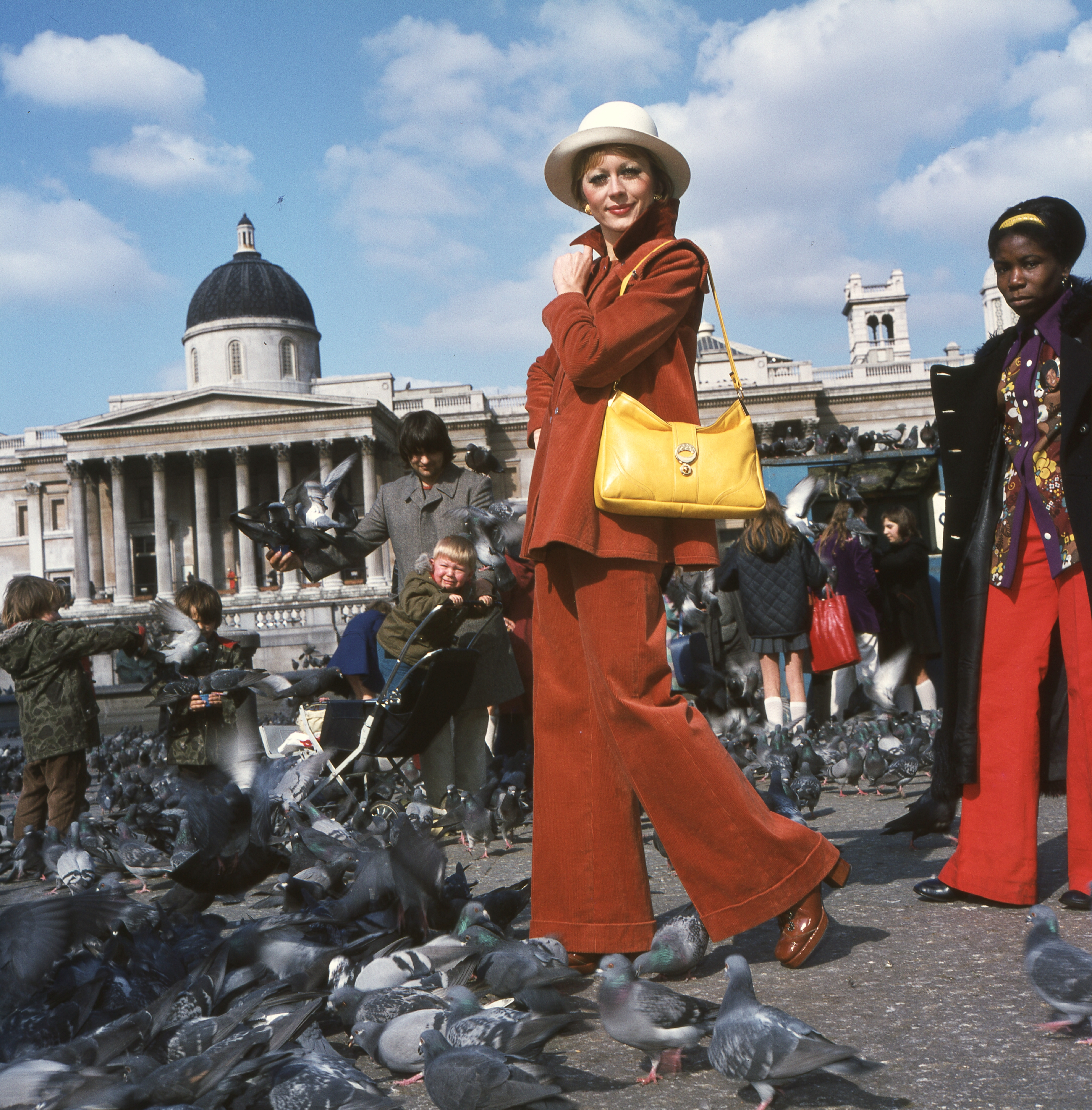 Trafalgar Square, szemben a londoni Nemzeti Galéria. Elöl Fekete Klári manöken. Location: United Kingdom Tags: colorful, fashion, dove, museum, bag, hat Title: Trafalgar Square, szemben a londoni Nemzeti Galéria. Elöl Fekete Klári manöken.